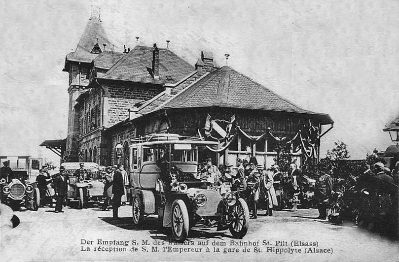 la reception de s.m. l'empereur a la gare de St. Hippolyte ST. PILT - ELSASS 1905